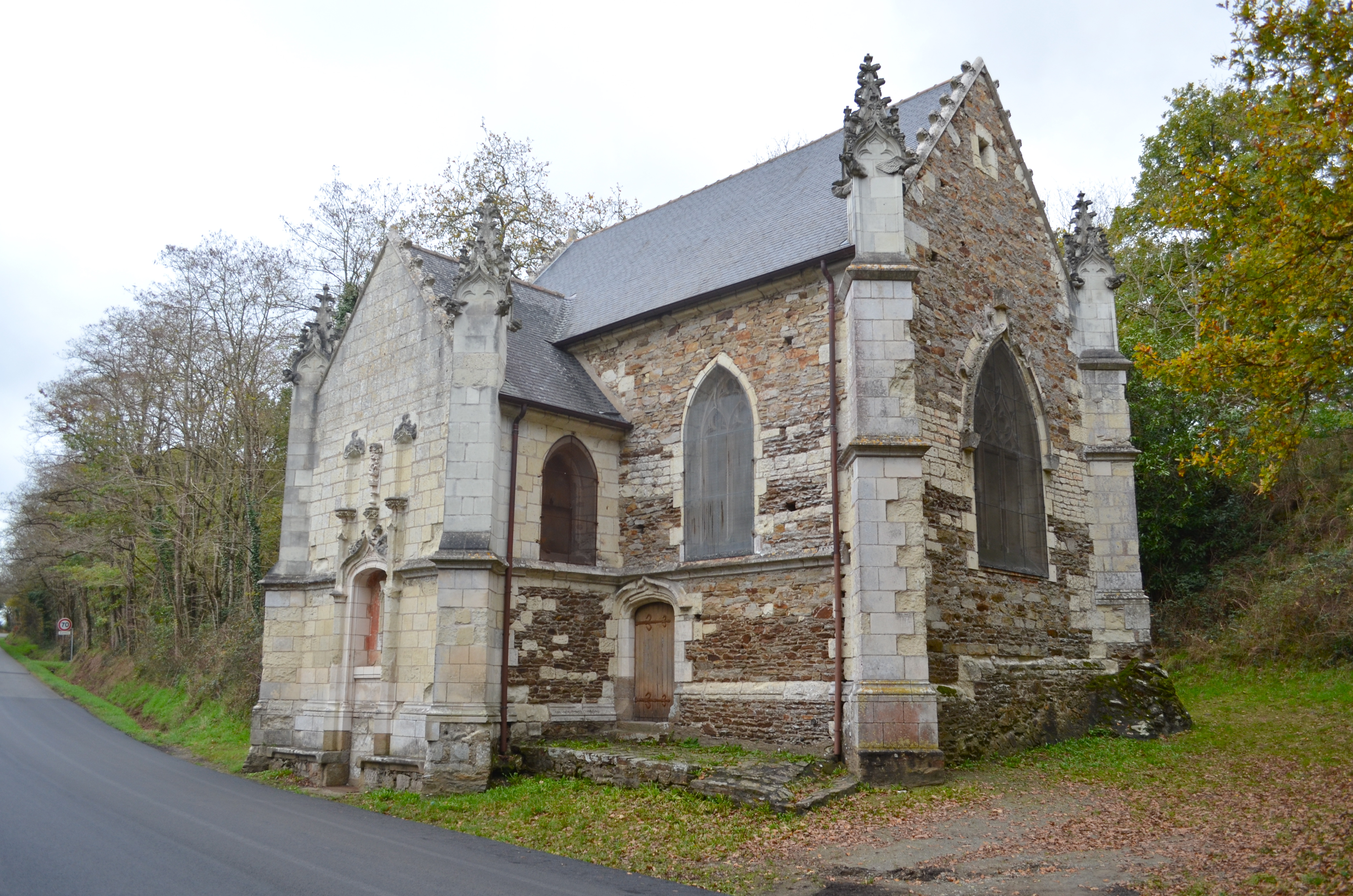 Chapelle de Bethléem - Saint-Jean-de-Boiseau (Loire-Atlantique)